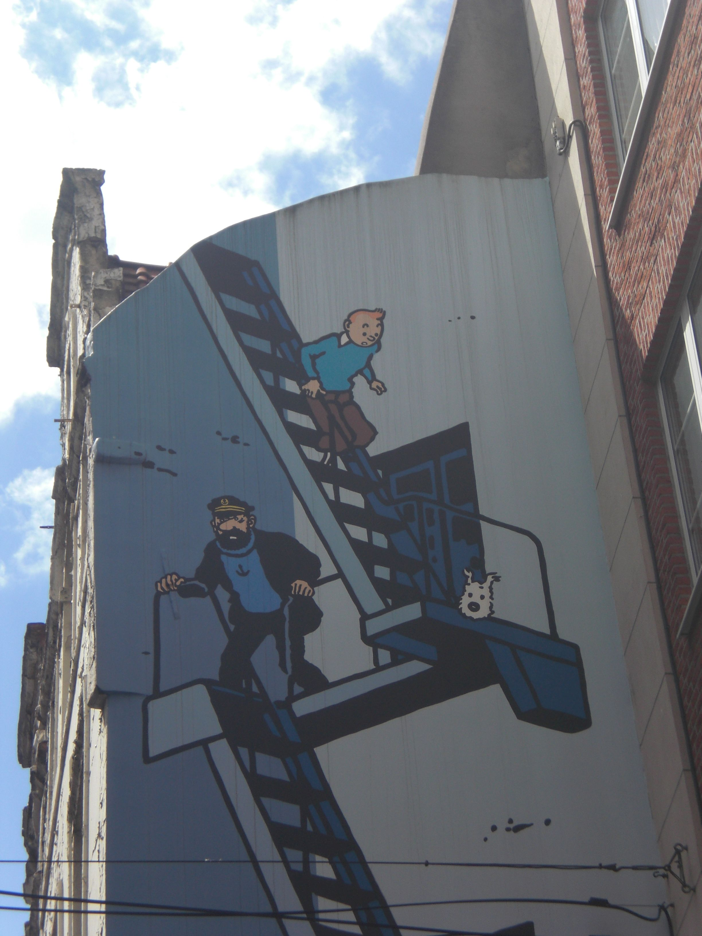 Tinĉjo kiel murpentraĵo en Bruselo